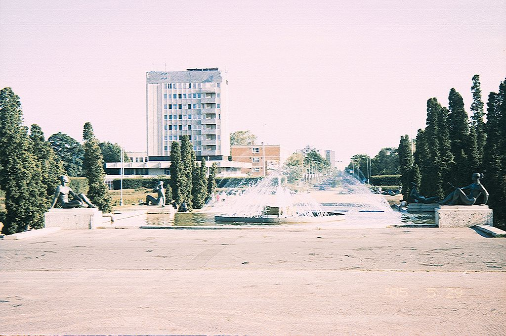 Debrecen Egyetempark